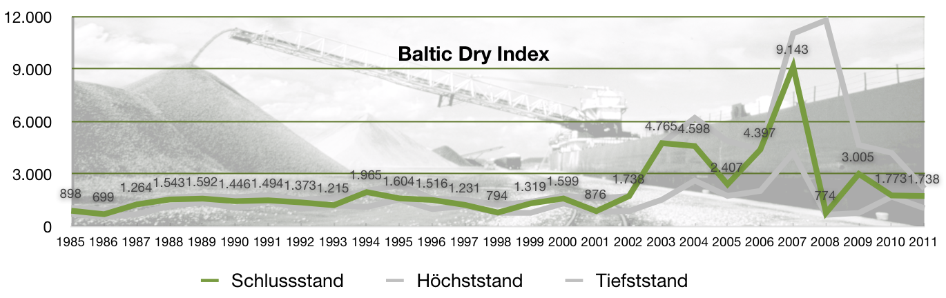 Baltic Dry Index since 1985 (Jahresschlussstand + Jahreshöchststand + Jahrestiefststand); Zahlen für 2010 (Stand Ende Mai). Basierend auf der Datentabelle siehe weiter unten.